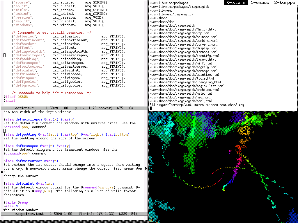 Ratpoison